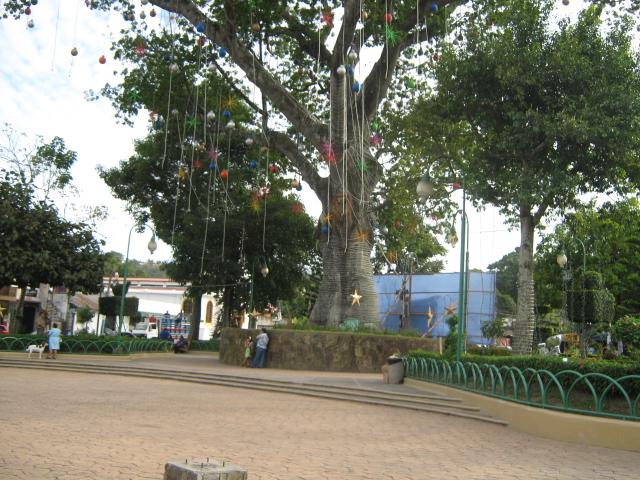 Parque central.